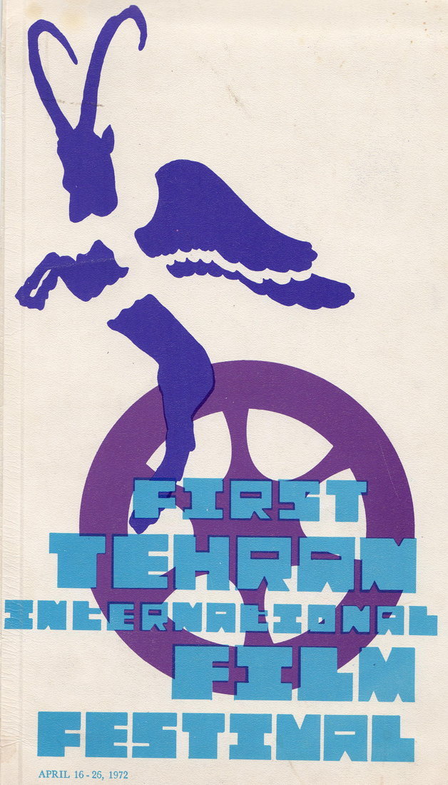 پوستر جشنوارهٔ جهانی فیلم تهران